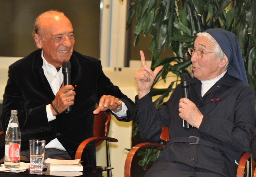 Jacques Séguéla et Soeur Marguerite Tiberghien, lors du lancement officiel du Fonds de Dotation Sœur Marguerite à l'UNESCO, à Paris le 12 avril 2011